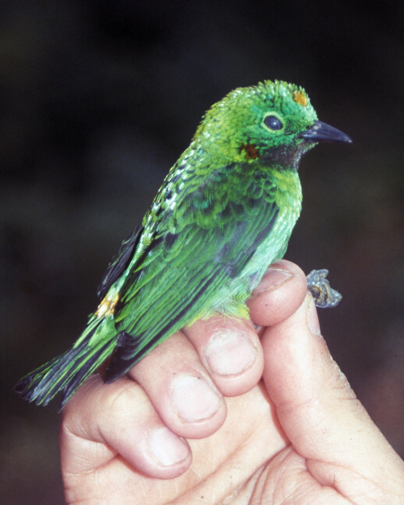 Orange-eared Tanager (Chlorochrysa calliparaea). Male from Cordillera del Cóndor, Ecuador.